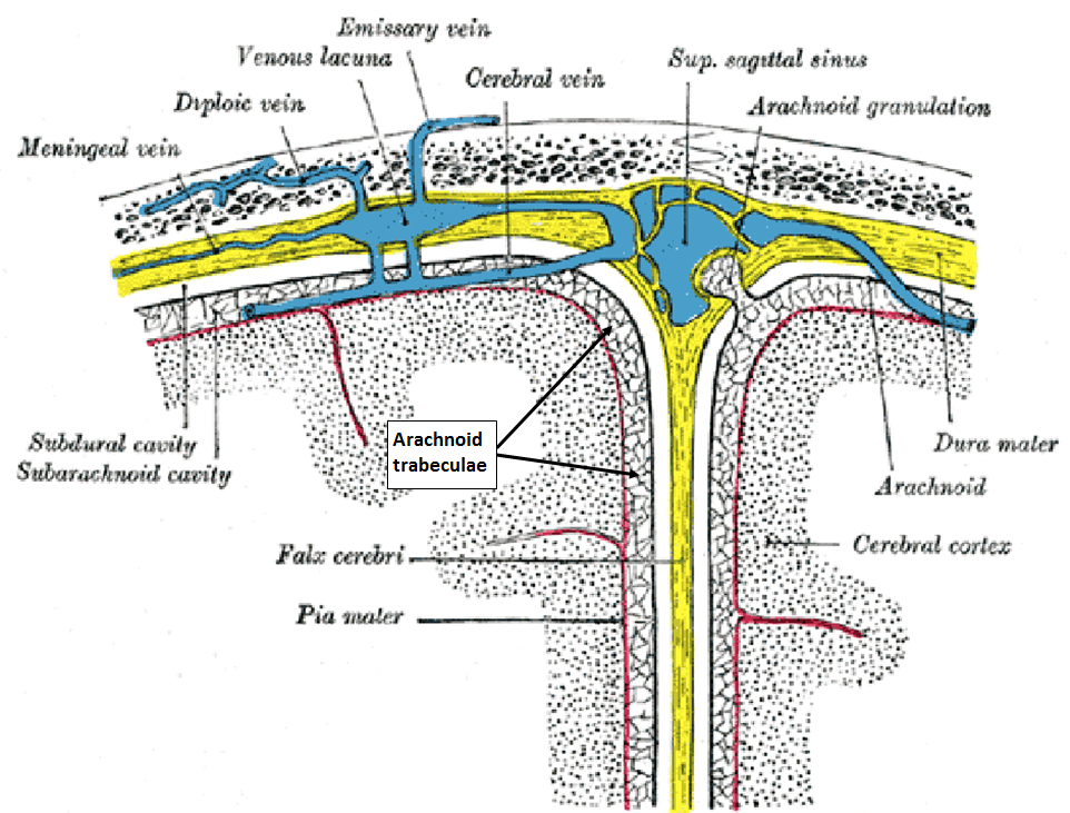 Arachnoid trabeculae